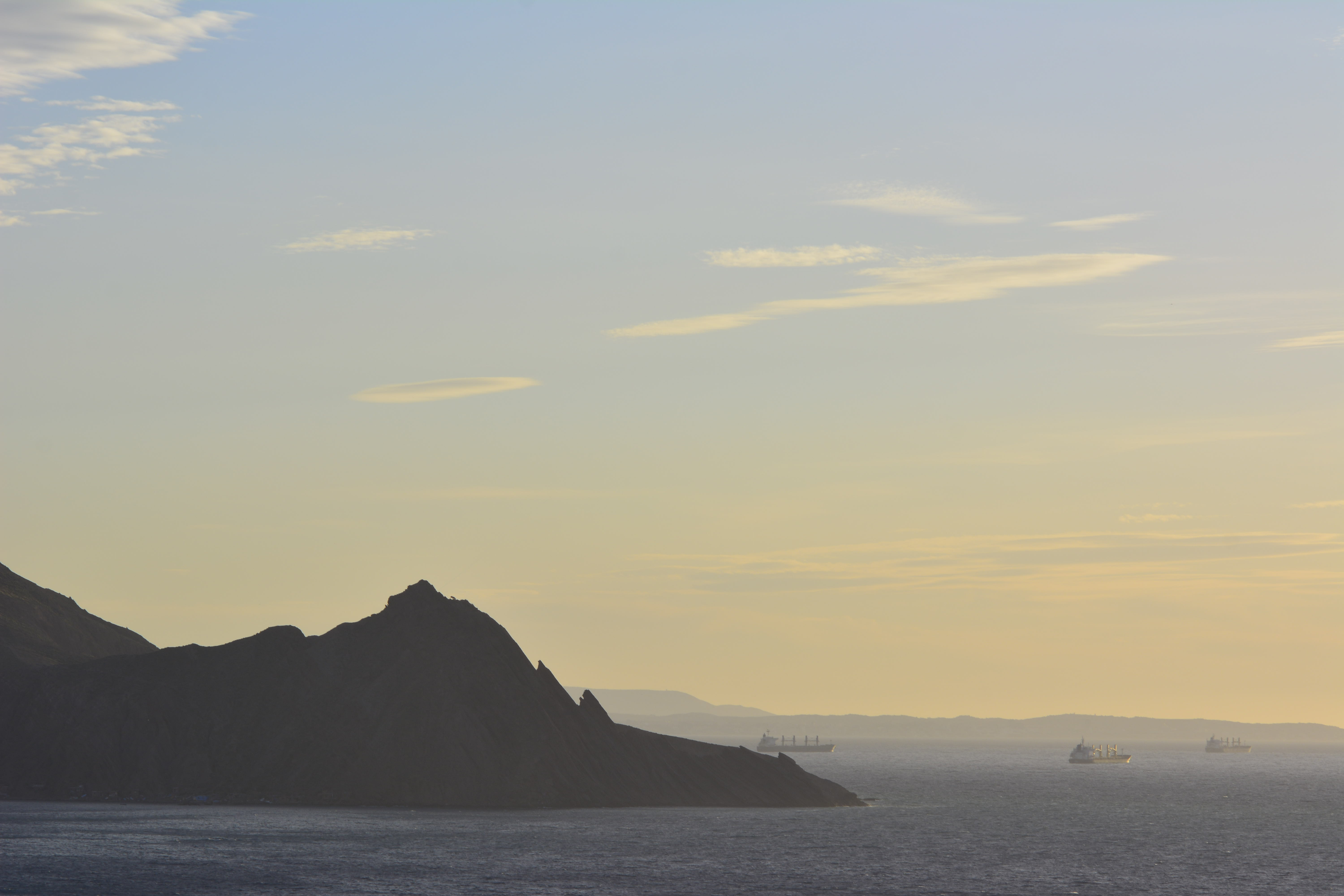 a oran une plage côté canastel et kristel qui s'appelle cap Rousseau